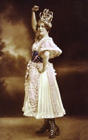 Kosáry Emma magyar koloratúrszoprán, színésznő. Kálmán Imre: Csárdáskirályné című operettjében.